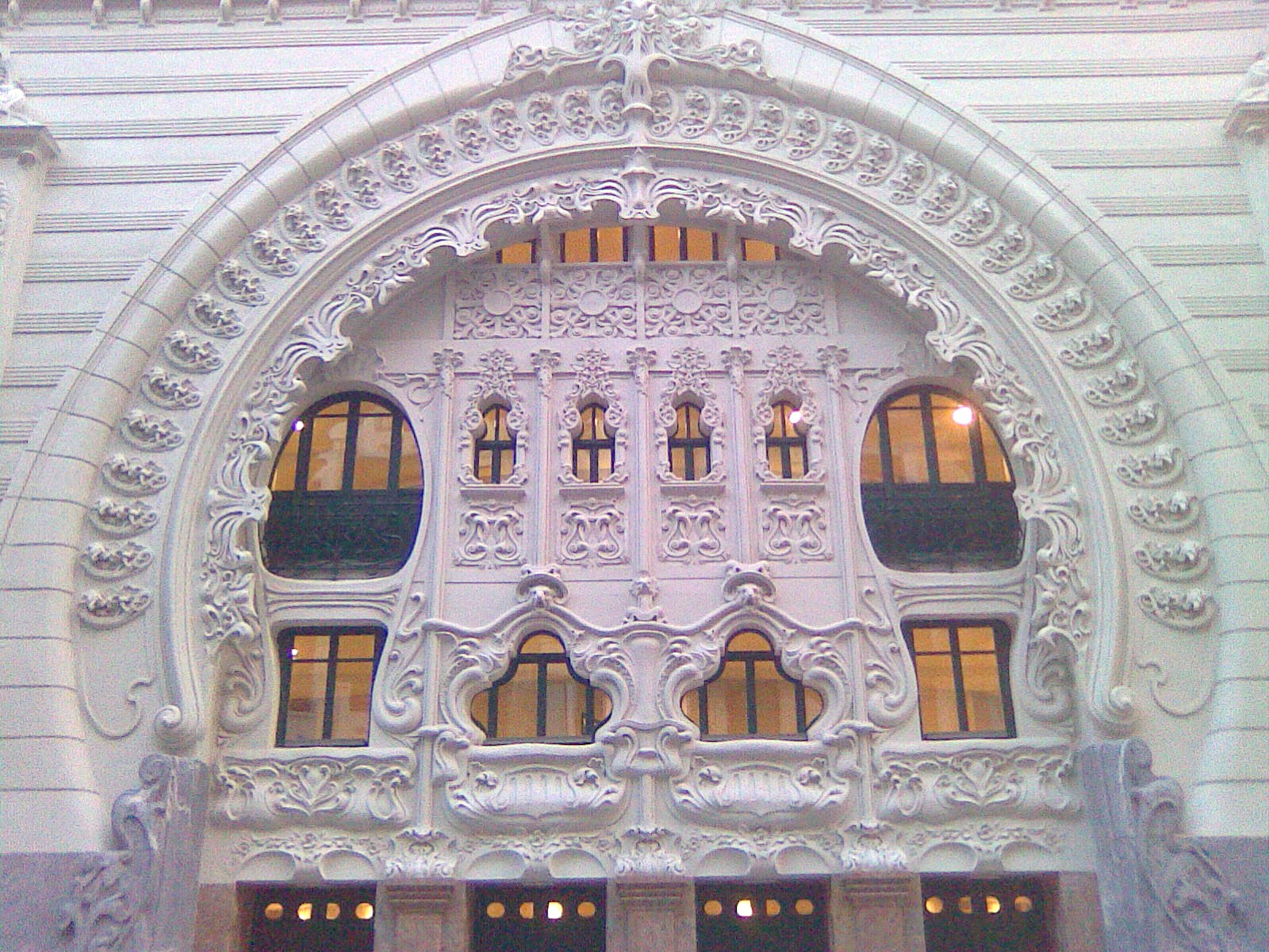 Campos Elíseos antzokia